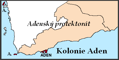 czech map of aden colony